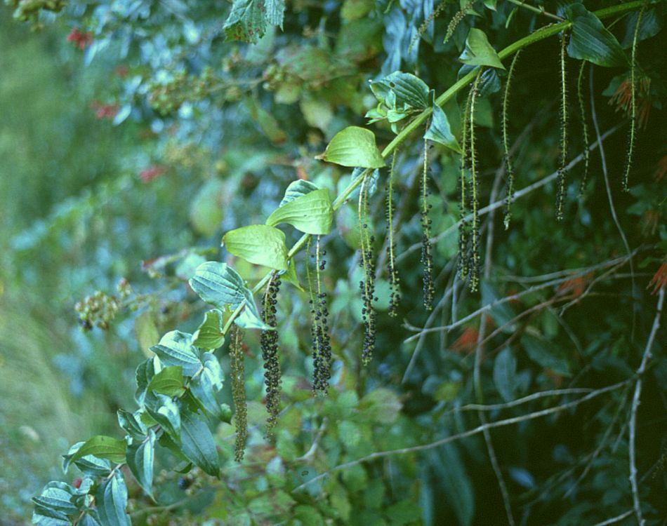 Coriaria ruscifolia, Coriariaceae - Chile, nahe dem Südufer des Sees Lago Llanquihue/cerca de orilla del sur del Lago Llanquihue/close to the southern shore of the lake Lago Llanquihue, ca. 13 km W Ensenada (Prov. de Llanquihue)